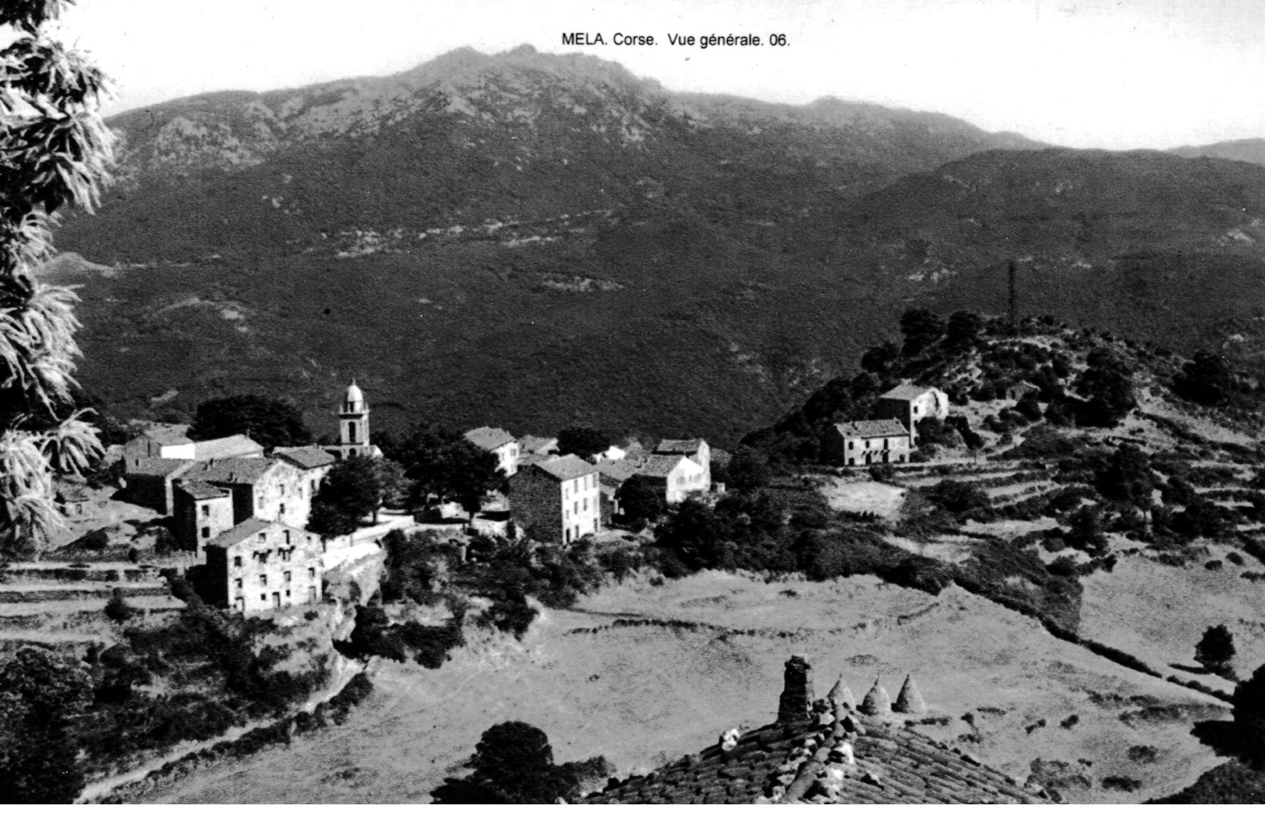 Le village dans la 1ère moitié du XXème siècle